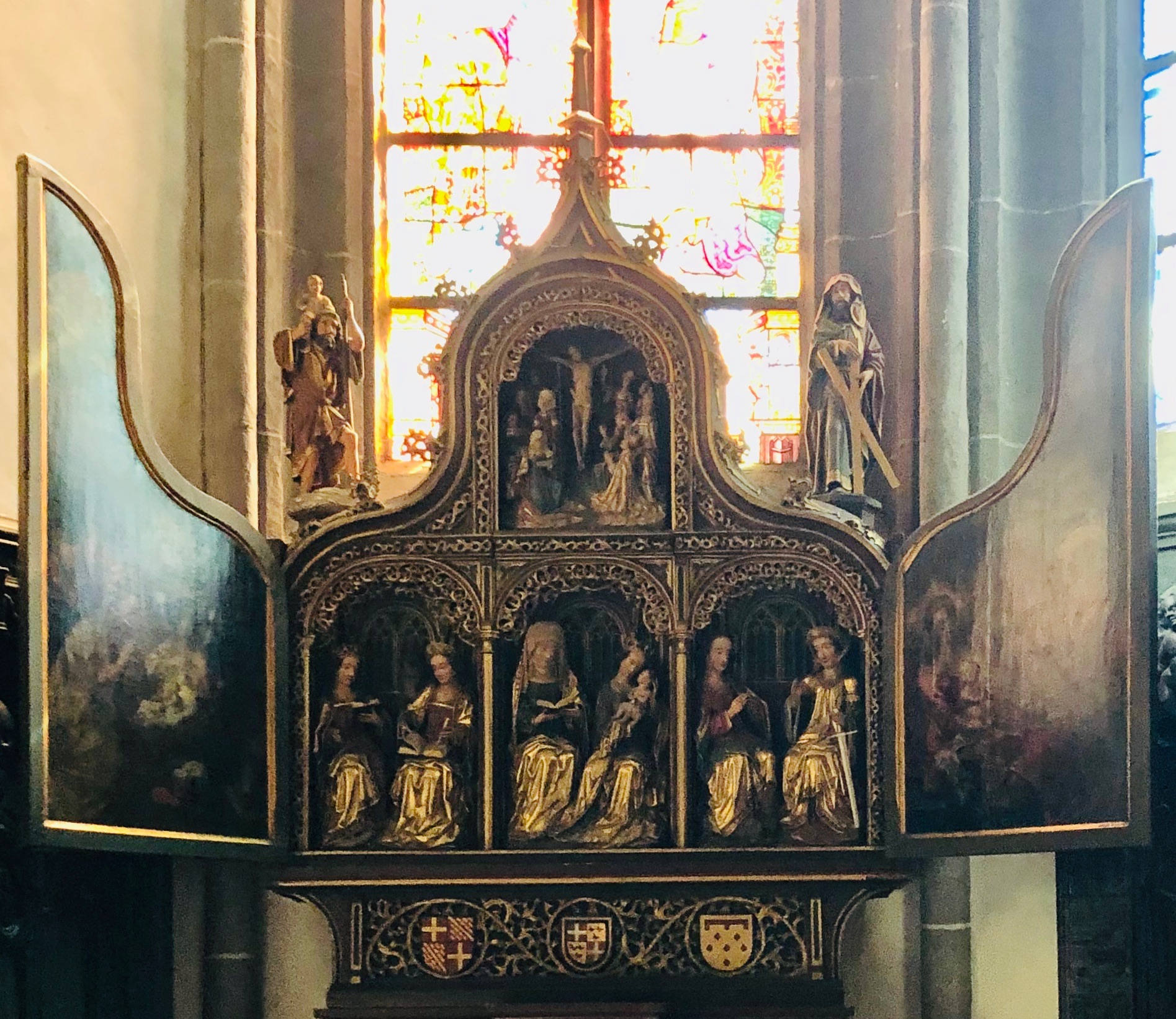 Annaaltar in der Probsteikirche St. Kornelius, Kornelimünster, Deutschland